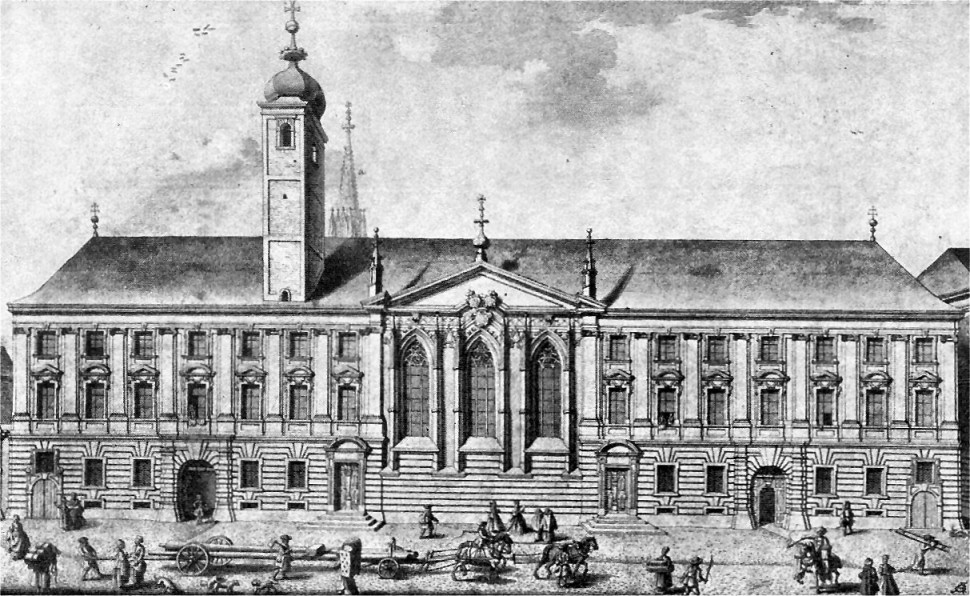 Deutschordenshaus mit Deutschordenskirche(Wien) 1733 Post-processing: noise reduction